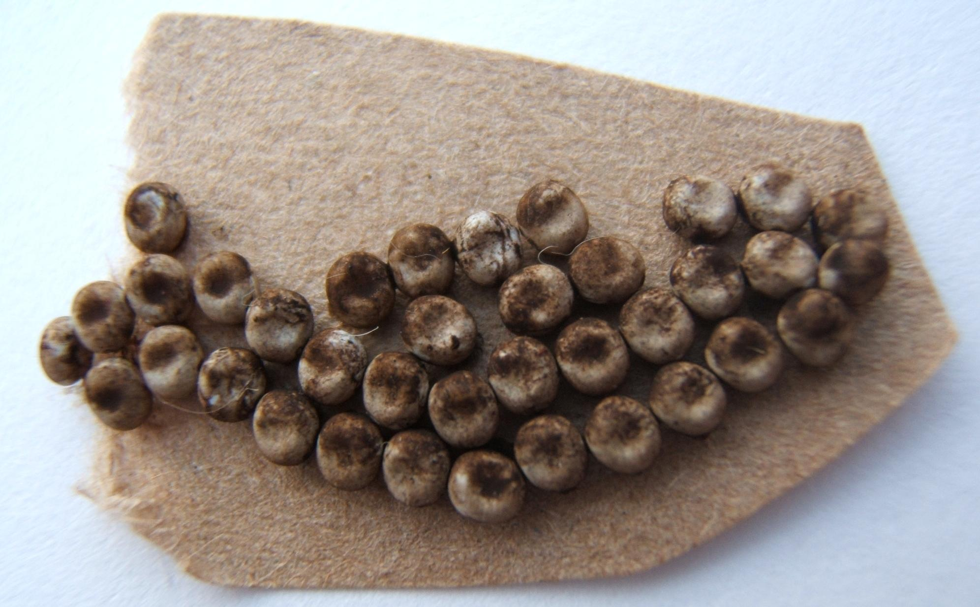 Actias luna eggs taken by Shawn Hanrahan.